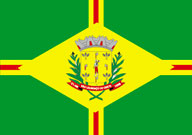 Drapeau de la municipalité de São Lourenço do Oeste - SC - Brésil